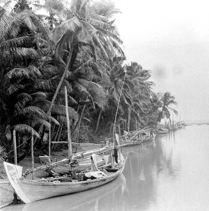 Repronegatief. Madoera, kustgezicht met klappers en vaartuigen